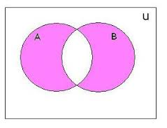 Simetrična razlika množic